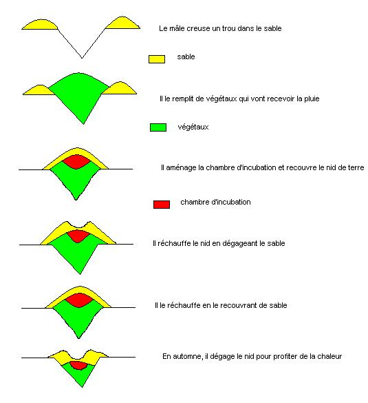 Nid de léipoa